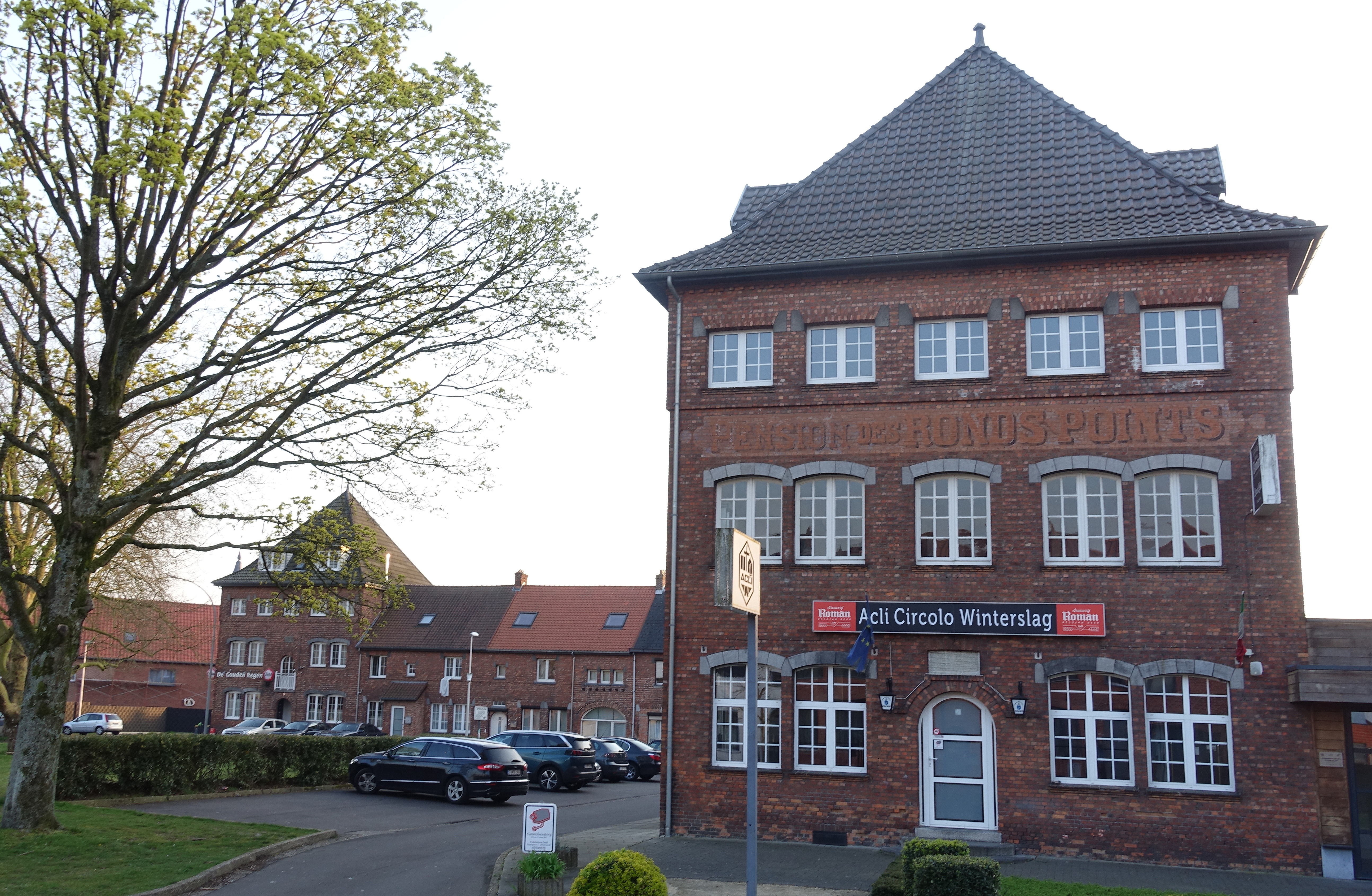 Het vroegere logementshuis "Pension des Ronds-points" op de hoek van de 'Clos des Cytises' uit 1919-1920 in de "Eerste Cité" van de koolmijn van Winterslag (Genk)